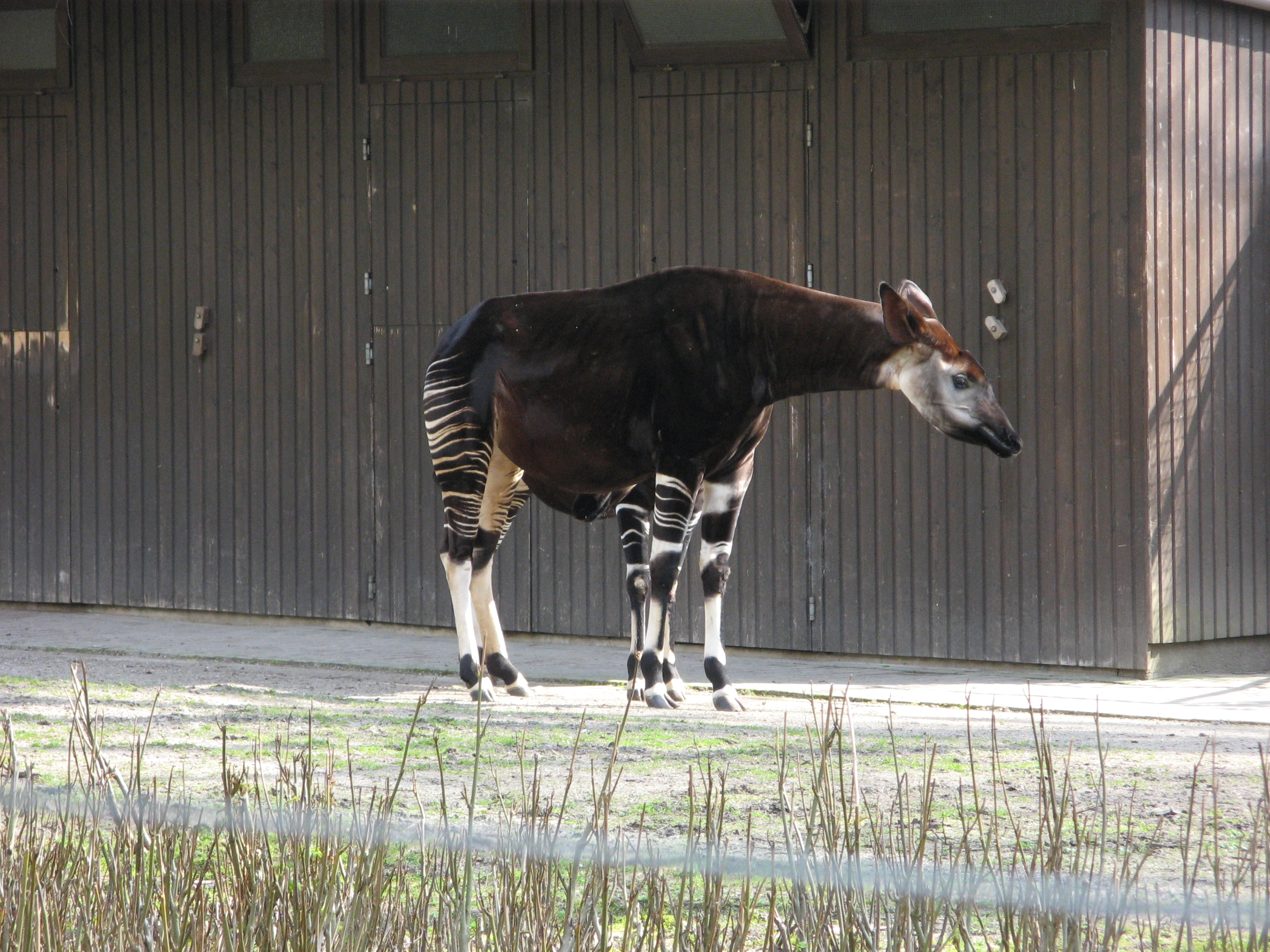 Ein Okapi im Wuppertaler Zoo vor seinem Stall